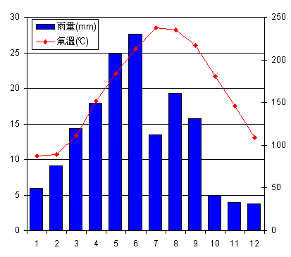 福州月均气温降水量统计图，wahapure使用Microsoft Excel绘制。